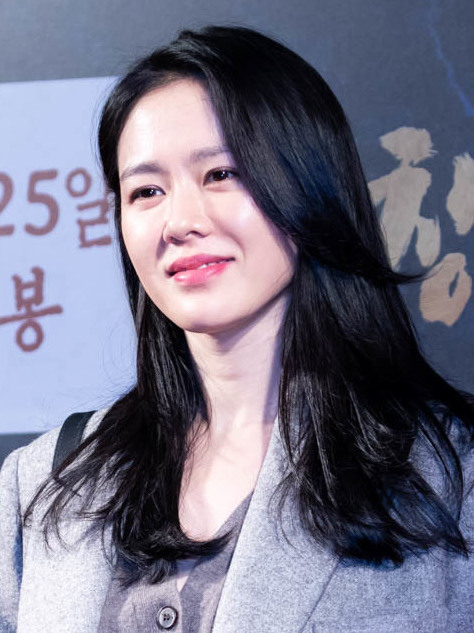 181018 창궐 VIP시사회 손예진